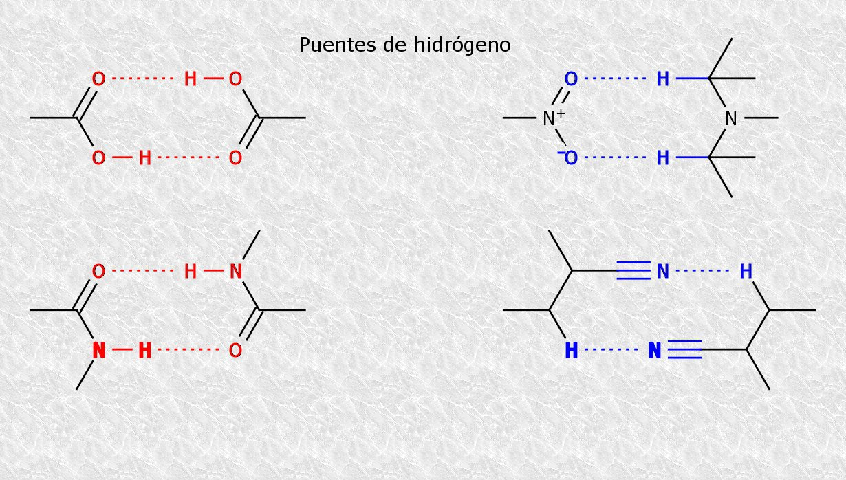 Situaciones moleculares que propician la formación de puentes de hidrógeno